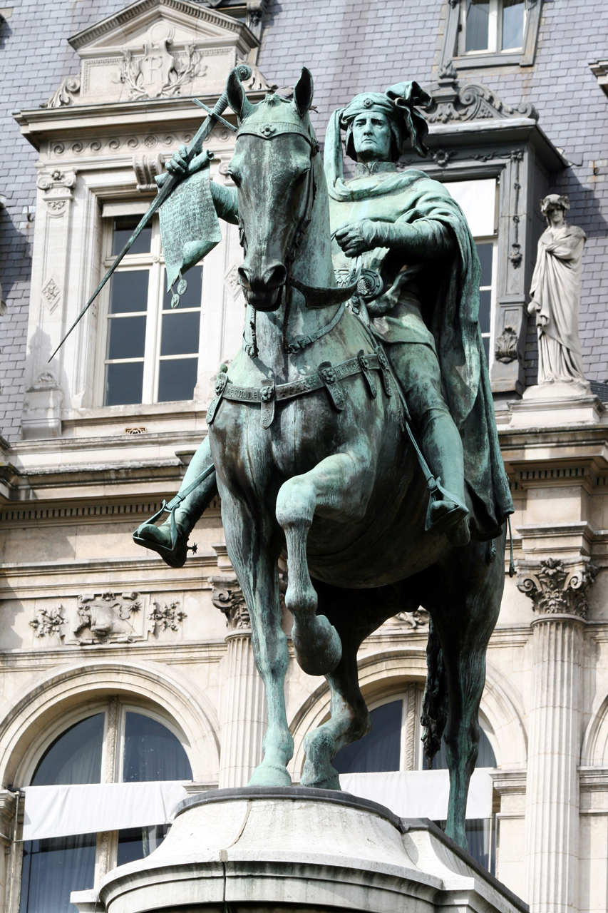 Statue d'Etienne Marcel à Paris